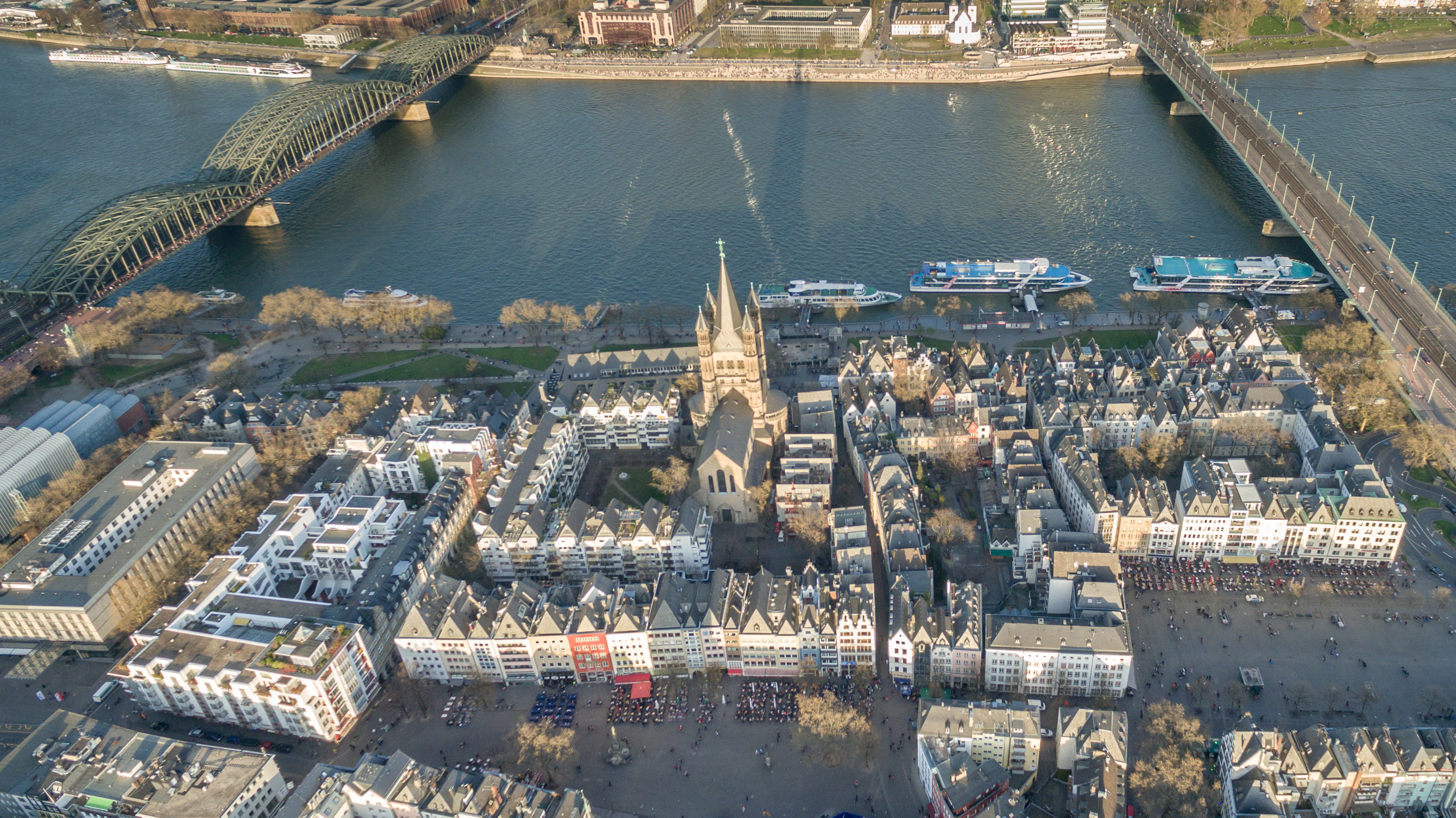 Kölner Altstadt Luftbild